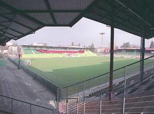 Stade de Charmilles vor dem Abriss